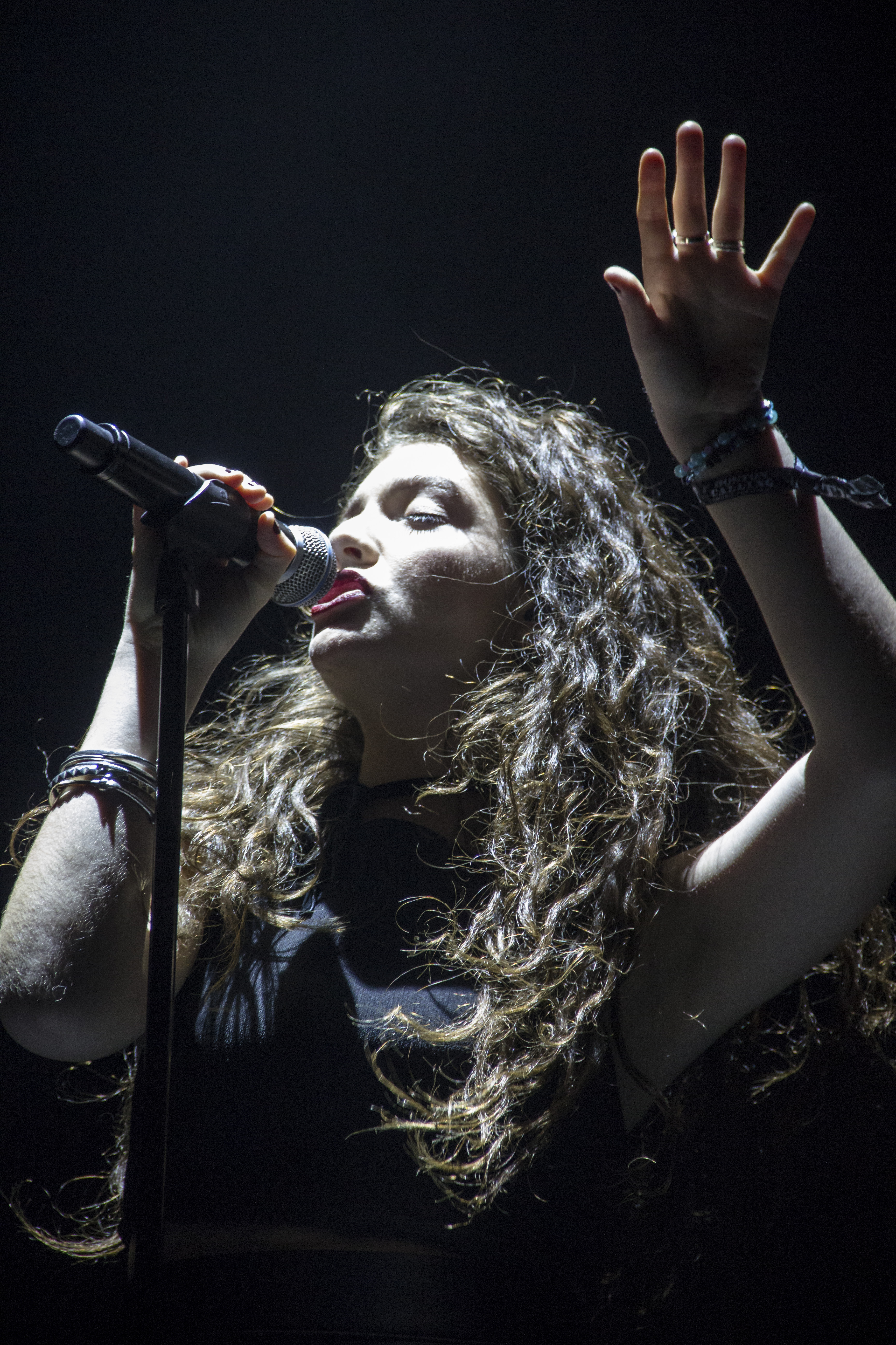 weeklydig